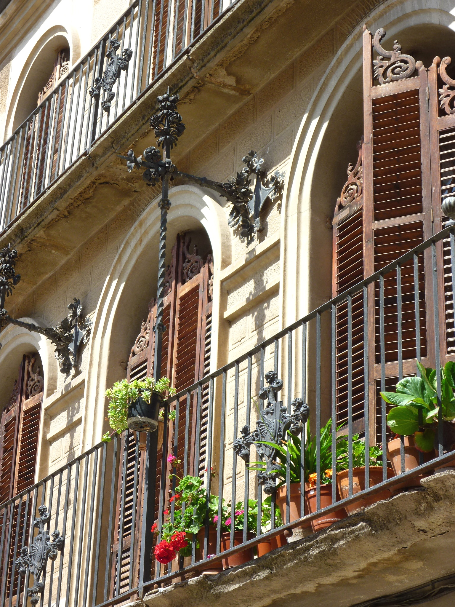 Cal Trilla (Torà): detall de les balconades